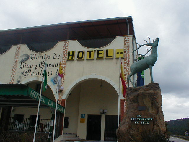 Walon: Otel e-n Espagne avou ene posteure di cier